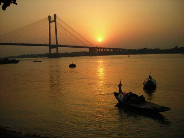 CalcuttaHooghly